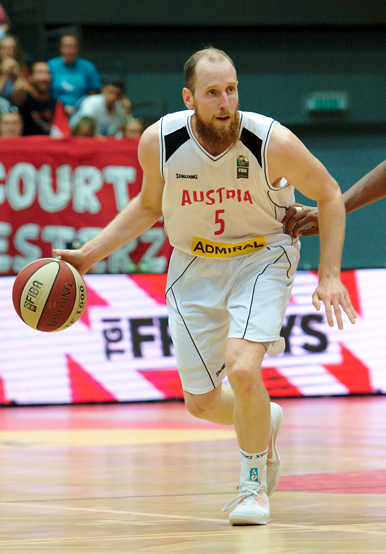 FIBA-Basketball EM-Qualifikation am 7.9.2016 im Multiversum in Schwechat, Österreich - Dänemark. Bild zeigt Thomas Schreiner (AUT).